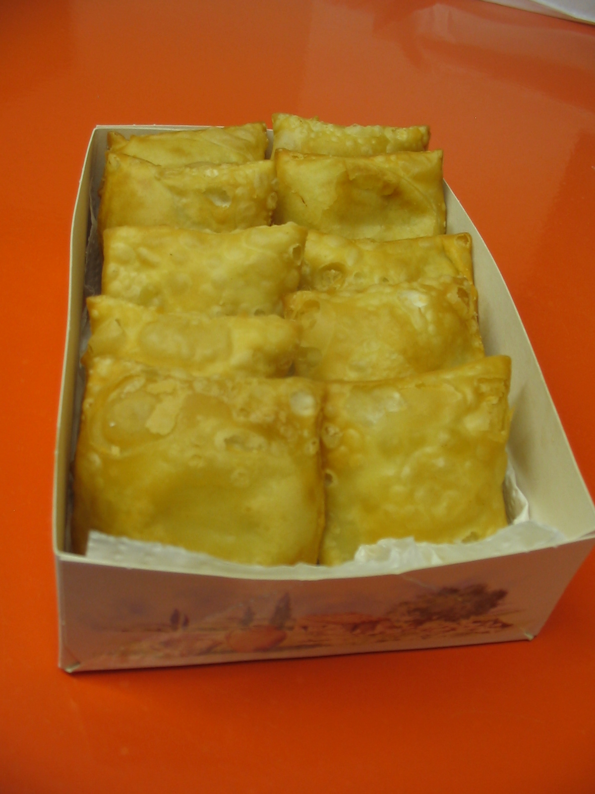 Tourtons des Alpes. Spécialité de la vallée du Champsaur (05). Je suis l'auteur du cliché pris en avril 2007.